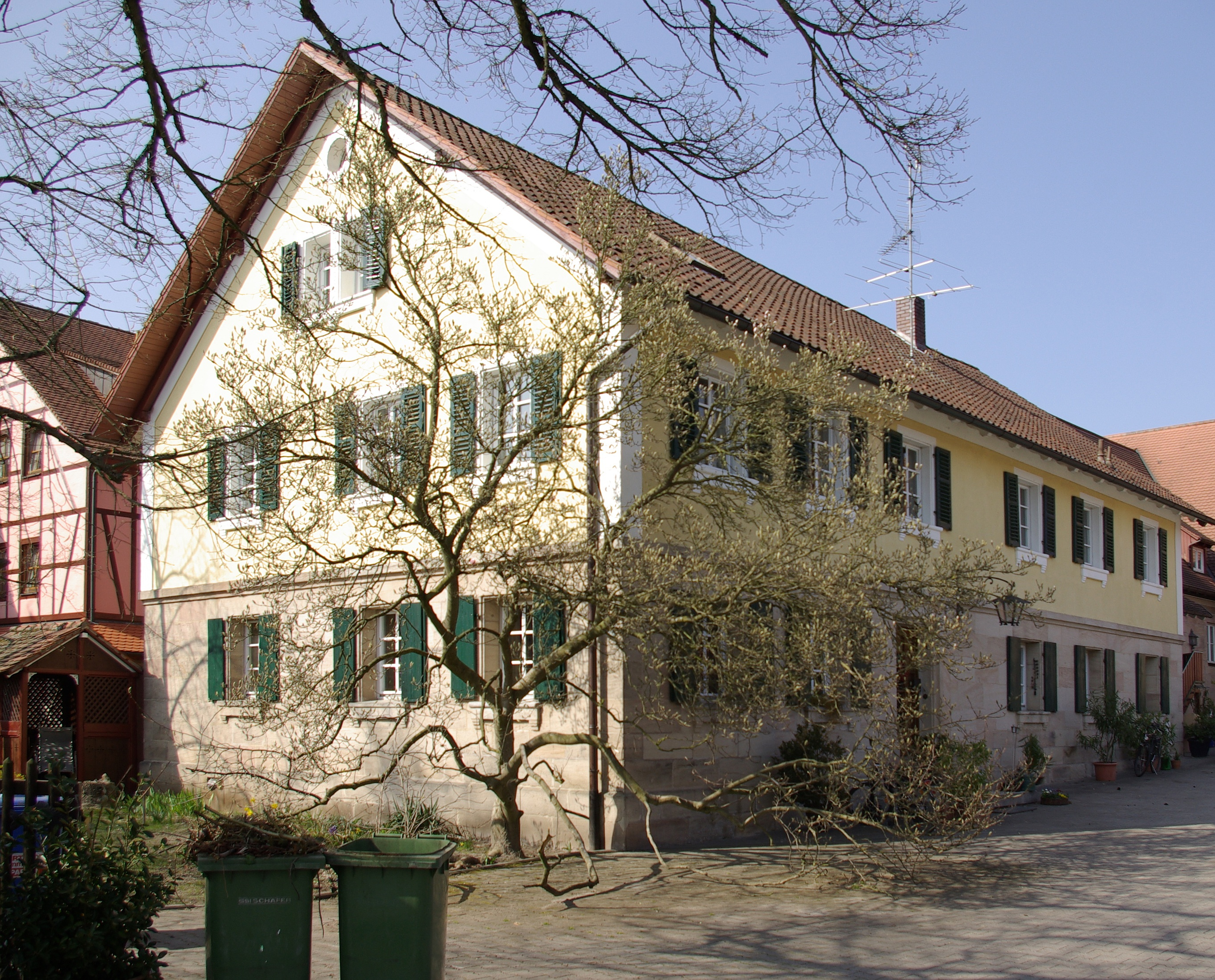 Der Nützel-Oberle-Hof (seit 1650 von der Familie Nützel-Oberle bewirtschaftet) im Erlanger Stadtteil Kosbach, seit 2000 mit Restaurant Die Fischerei